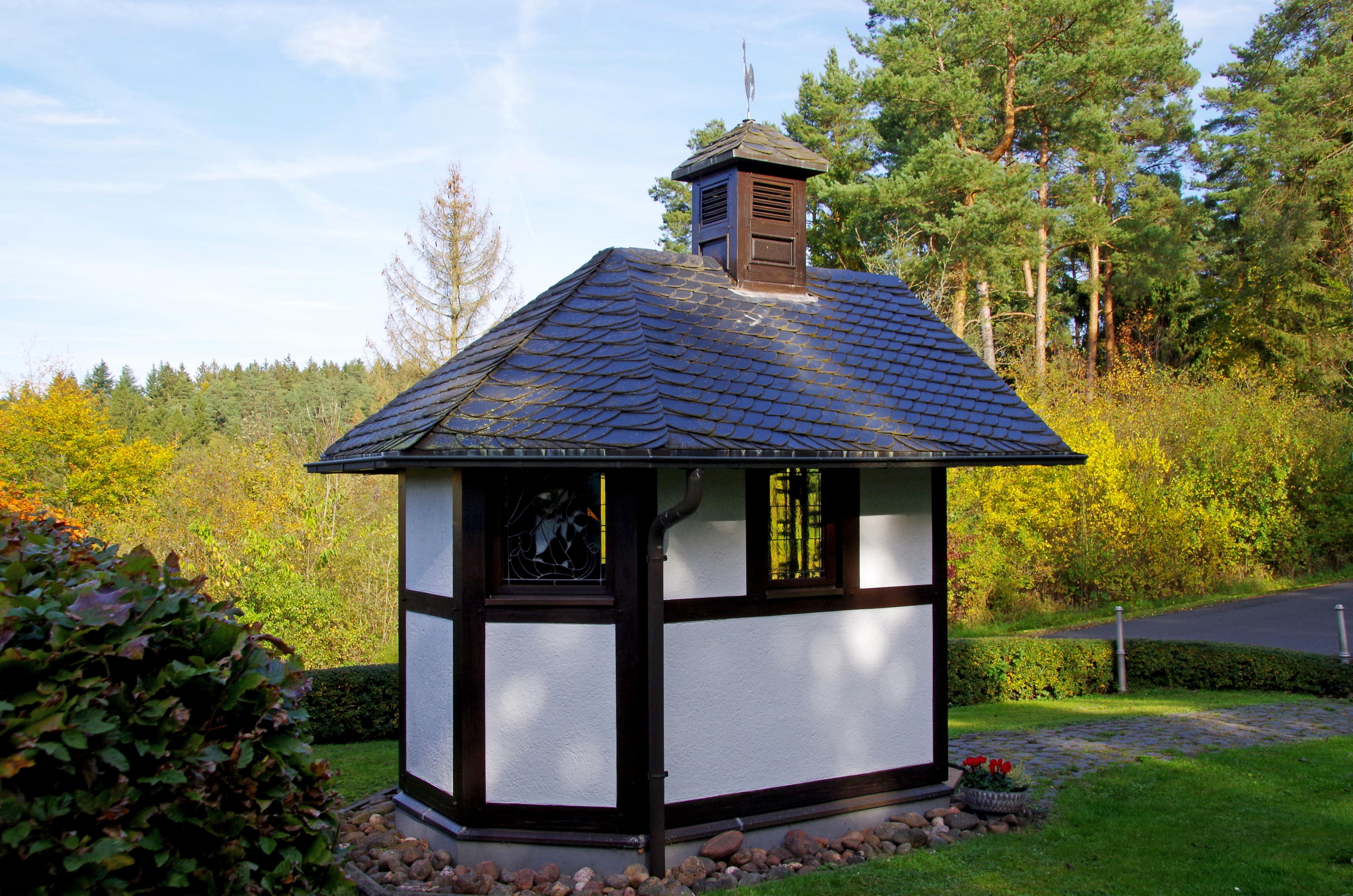 Wintzen, Kapellenrückseite